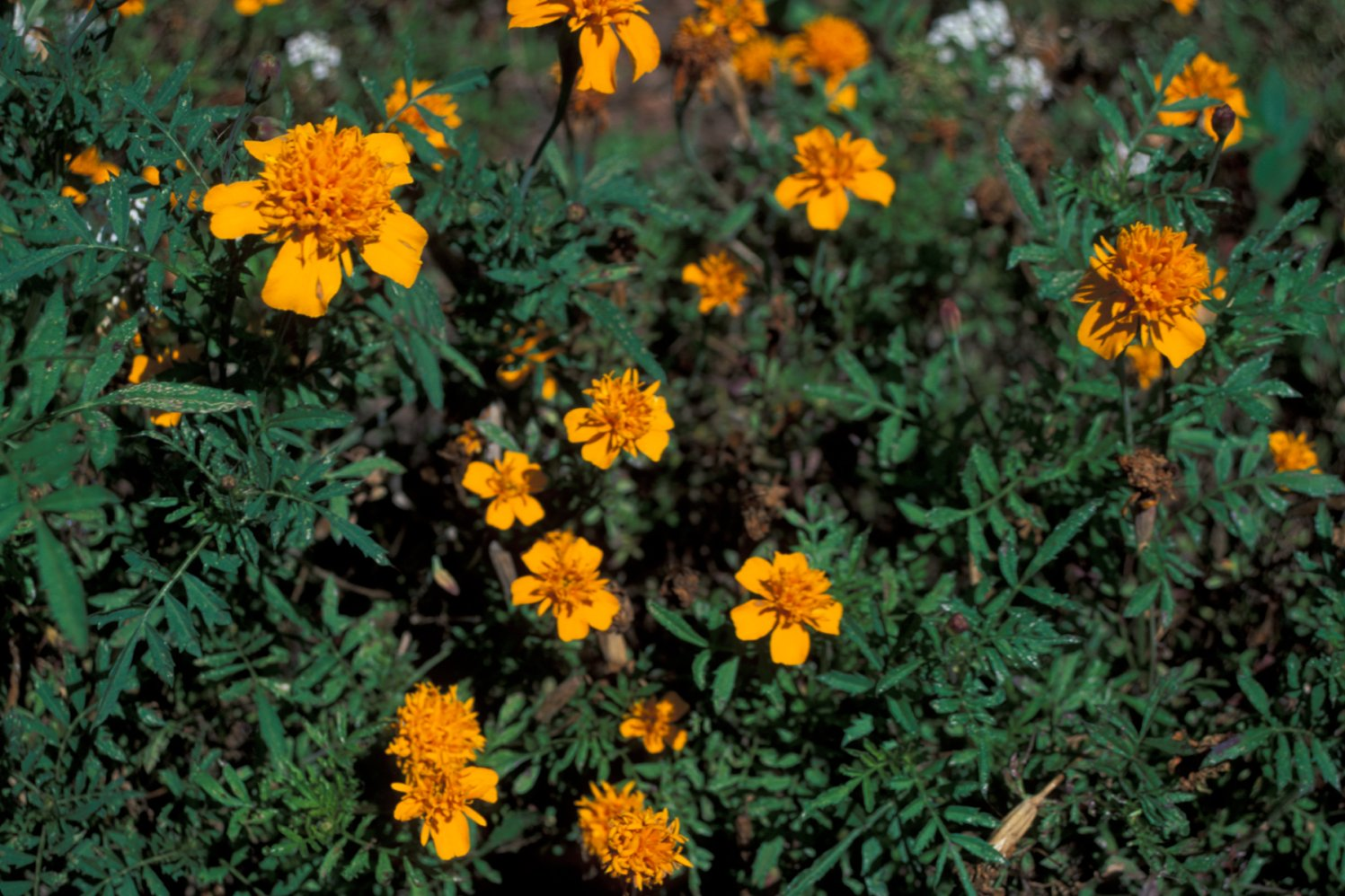 Piante di Tagetes sp fiorite